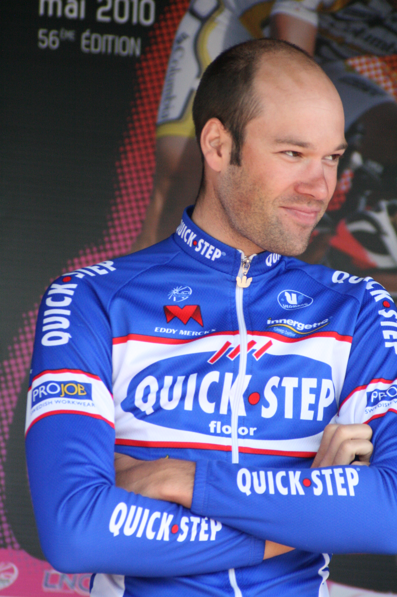 Kevin Van Impe, lors de la présentation des équipes des 4 jours de Dunkerque 2010